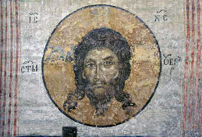 "Христос Урбус", Боянска църква, 1259 г.